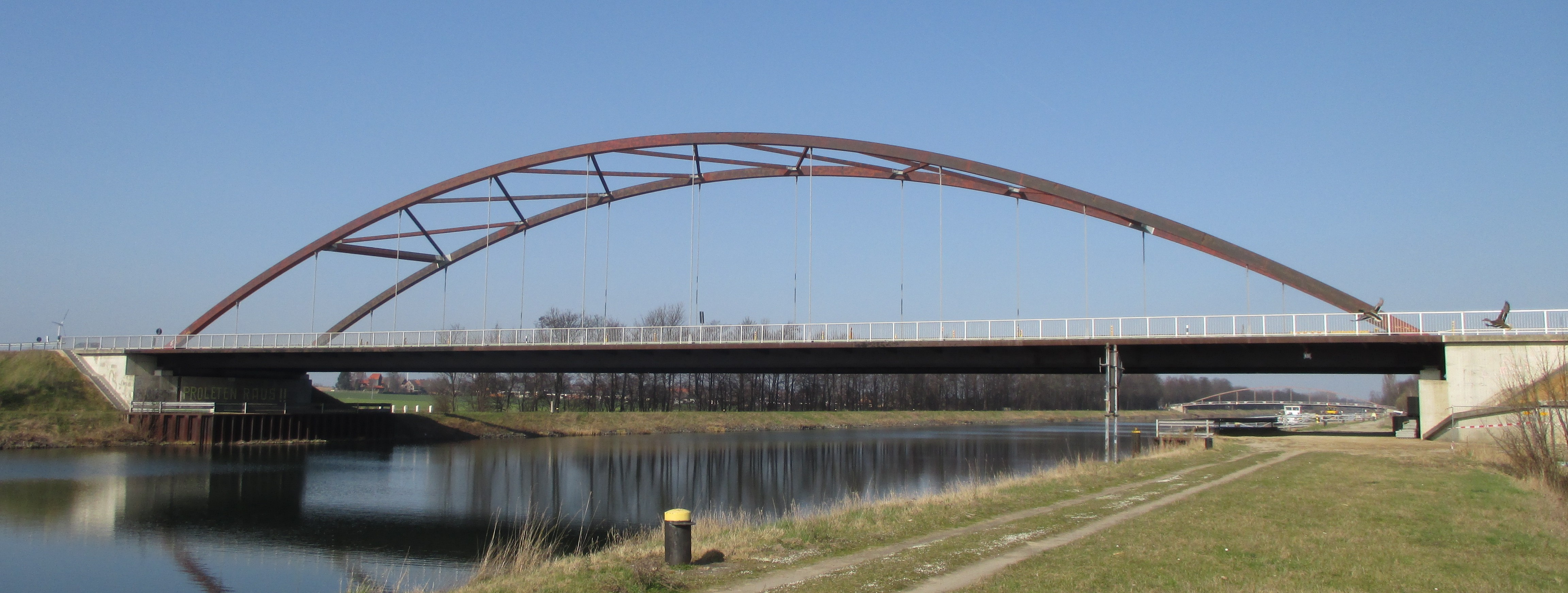 Brücke über den Stichkanal Salzgitter zwischen Beddingen und Bleckenstedt. Straße: Industriestraße Nord